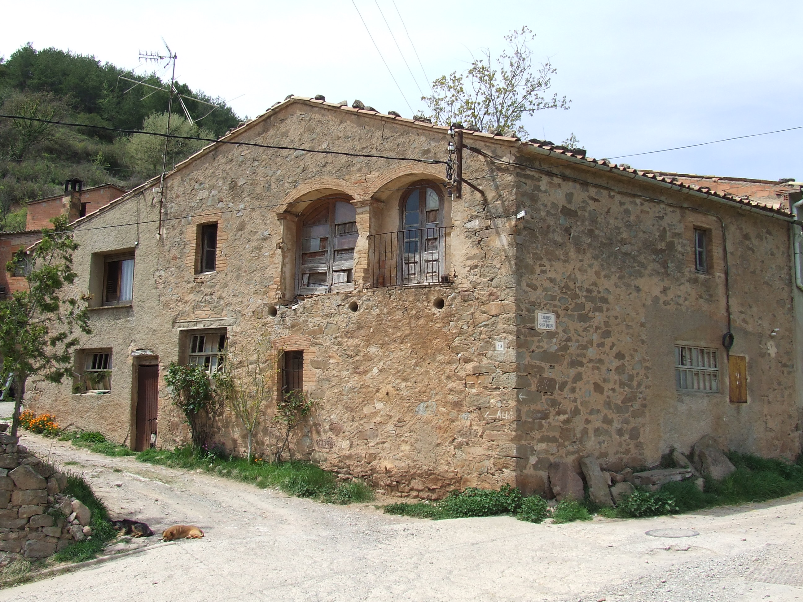 Cal Noguera (l'Estany, Moianès)